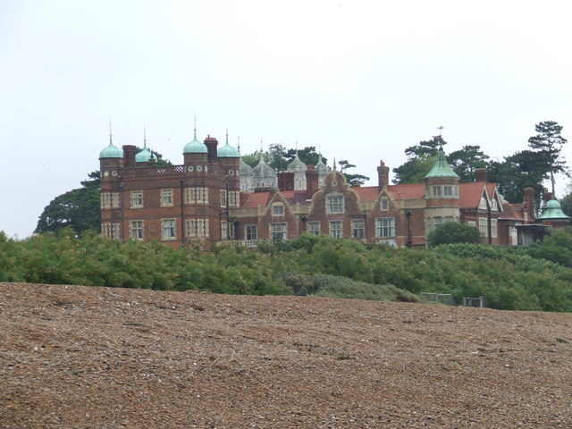 Bawdsey Manor